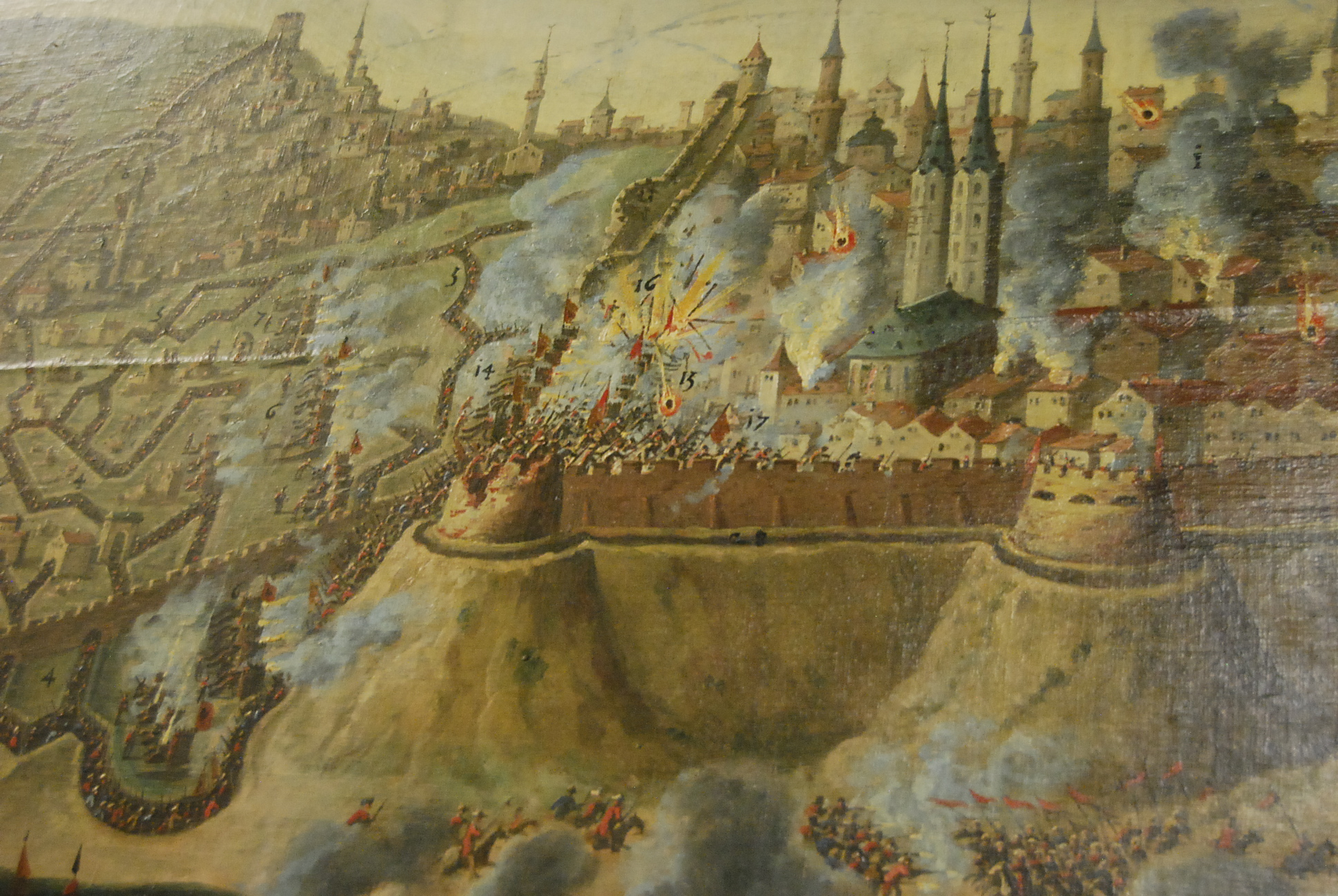 Battle of Buda (1686).label QS:Len,"Battle of Buda (1686)." label QS:Lfr,"Siège de Buda par les autrichiens en 1686" label QS:Lhu,"Esztergomi rondella, Buda ostroma 1686-ban. Frans Geffels korabeli festményének részlete."